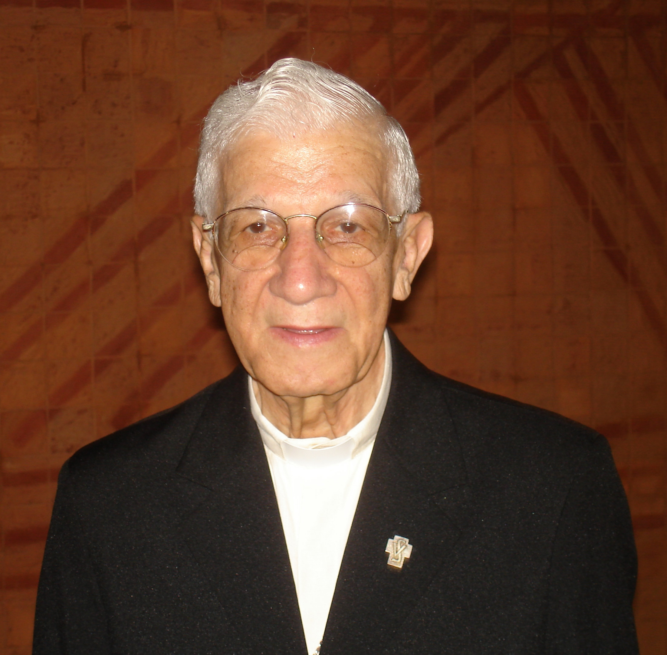 Archbishop Vicente Joaquim Zico, CM (1927 - ) Belém, Pará, Brazil December 30, 2006 Vicente Joaquim Zico